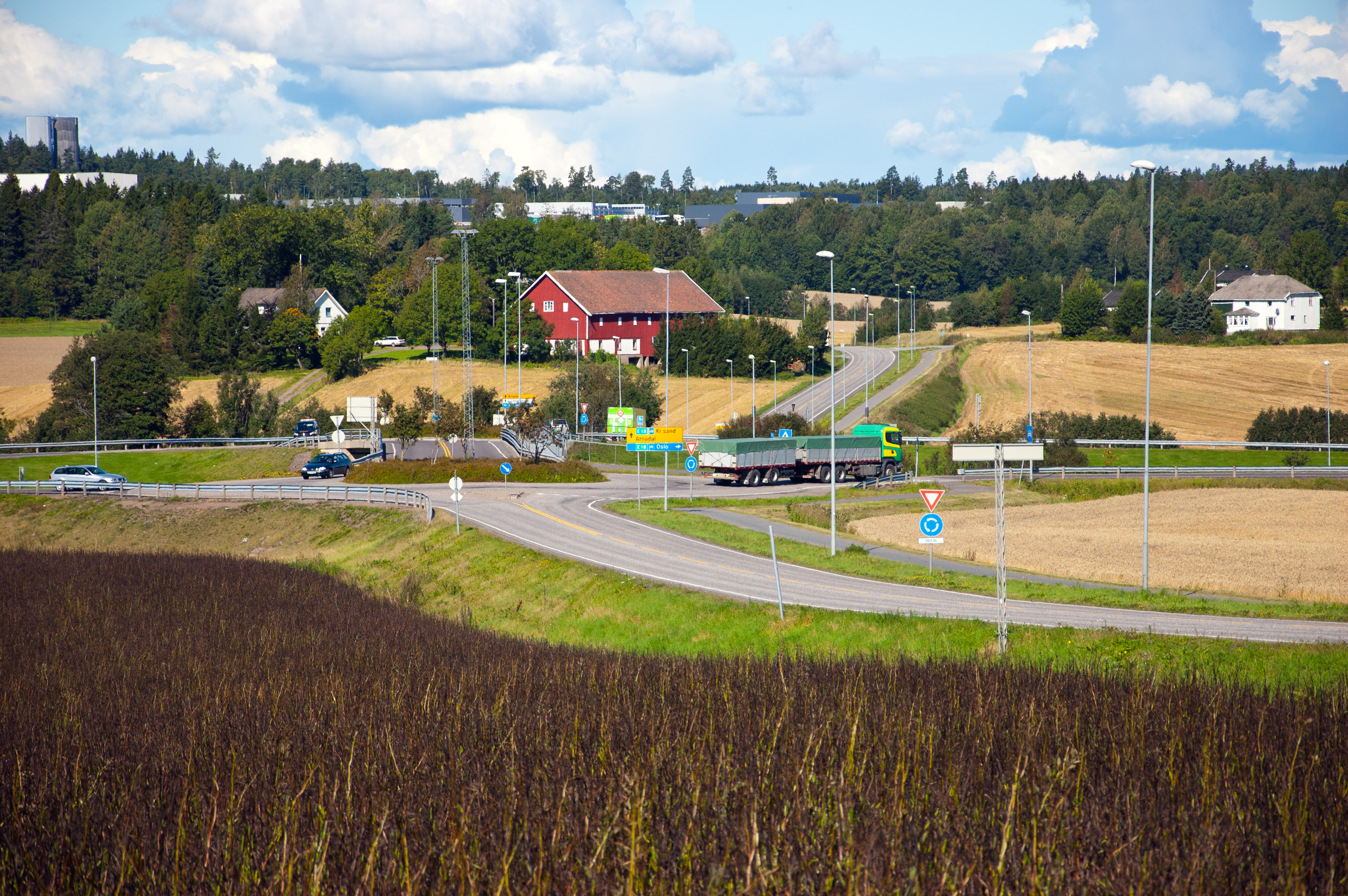 Fylkesvei 560 krysser E18 i Stokke, Vestfold